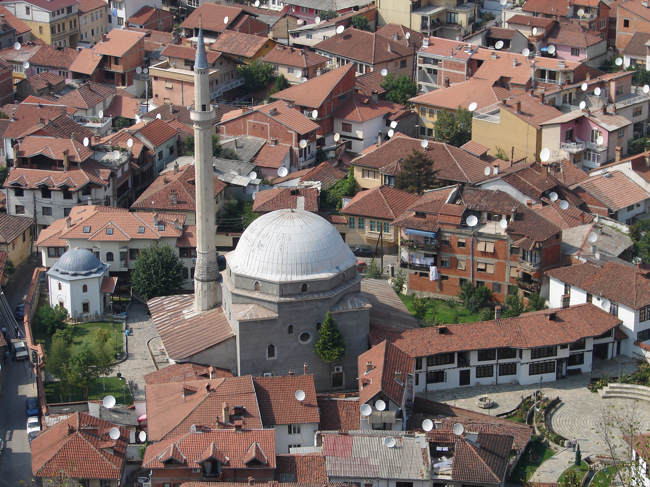 Mosque in Prizren, Kosovo